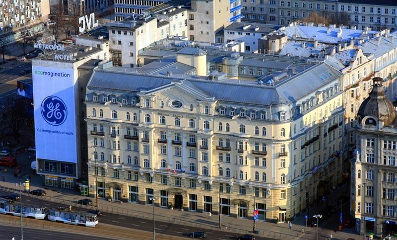 Warszawa (Polska)